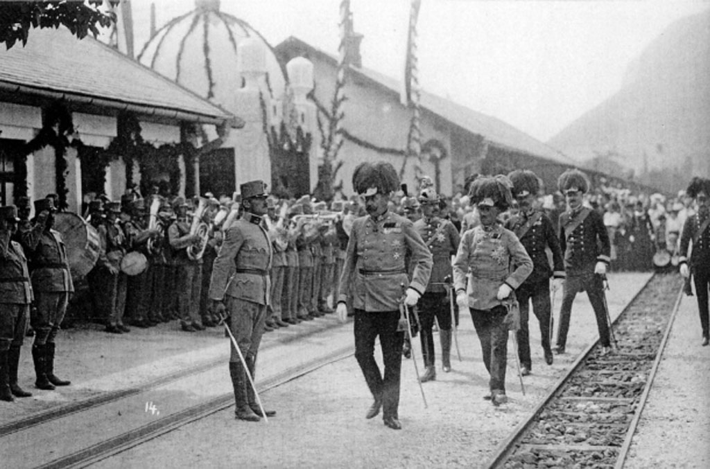 Empfang von Franz Ferdinand von Österreich in MostarFranz Ferdinand kam am Morgen des 25. Juni 191 mit dem Schiff im Hafen von Ploče an, von wo er nach Mostar weiterreiste. Anschließend fuhr er weiter nach Ilidža, wo er Quartier nahm. Am 26. und 27. Juli reiste er mit dem Zug nach Tarčin, um militärische Manöver zu besichtigen. Am 28. Juni fuhr er mit einem Sonderzug von Bad Ilidža nach Sarajevo, wo er bekanntlich beim Attentat von Sarajevo ermordet wurde.